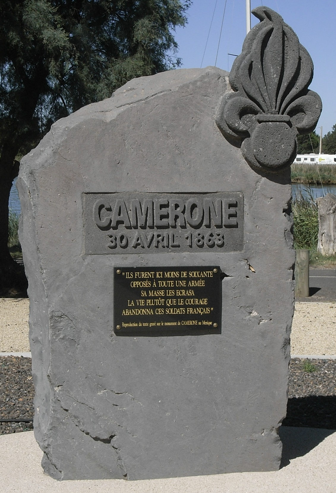 Monument aux morts de la bataille de Camérone qui s'est déroulée le 30 avril 1863 au Mexique. Il est situé à Agde (34) en France. Inscription sur la plaque : " ILS FURENT ICI MOINS DE SOIXANTE OPPOSÉS À TOUTE UNE ARMÉE SA MASSE LES ÉCRASA LA VIE PLUTÔT QUE LE COURAGE ABANDONNA CES SOLDATS FRANÇAIS " Reproduction du texte gravé sur le monument de CAMERONE au Mexique